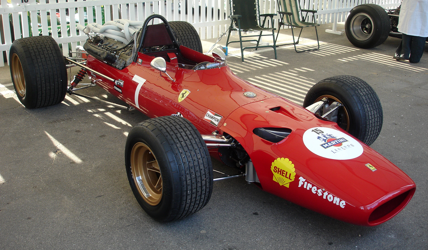 Ferrari 312 exposat al festival Martini Legends (commemoració del 75 aniversari del Circuit de Montjuïc)